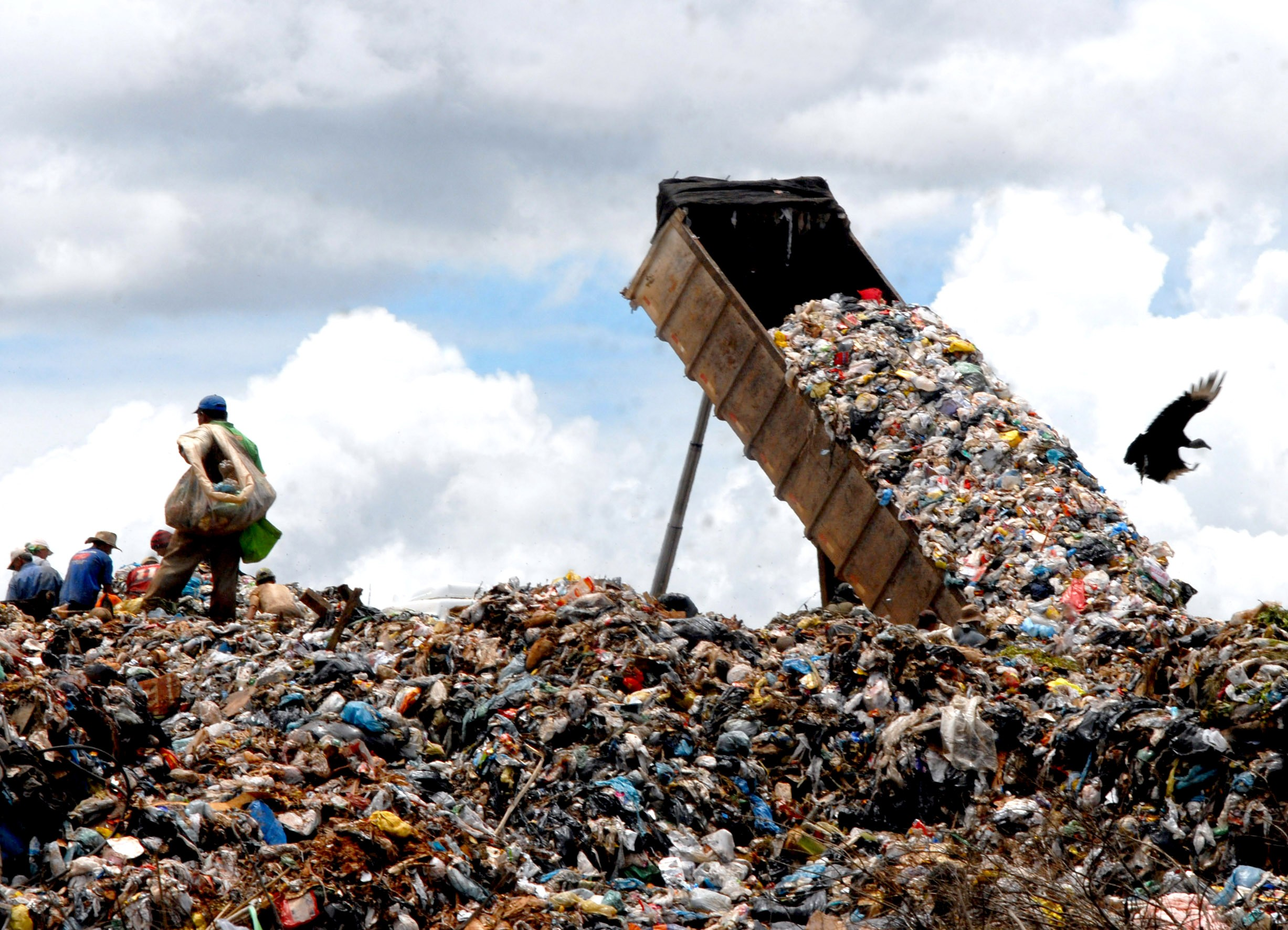 Caminhão de lixo no Lixão da Cidade Estrutural, DF-BR.